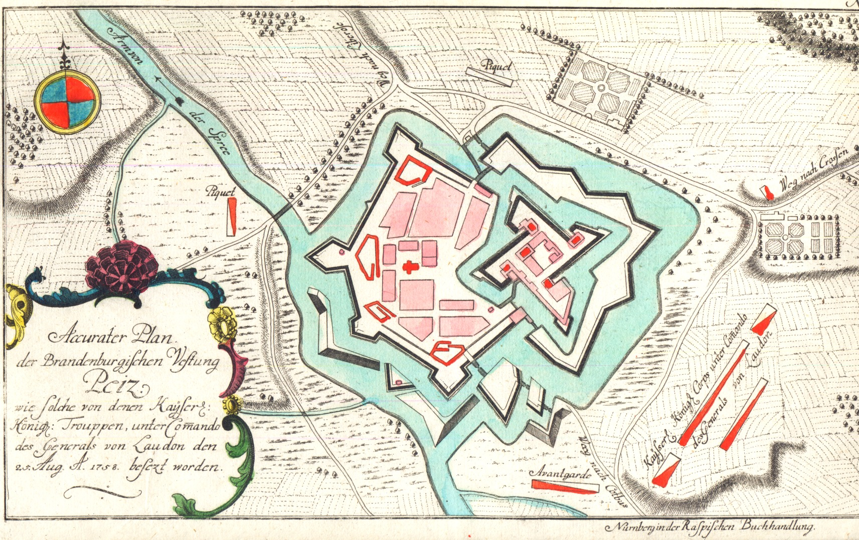 Austrian siege of the fortification Peitz, Title: "Accurater Plan der Brandenburgischen Vestung Peiz. wie solche von denen Kayserl. Königl. Trouppen, unter Commando des Generals von Laudon den 25. Aug. A. 1758 besezt worden." „Der Plan der Stadt mit den Befestigungen ist richtig und stimmt mit dem Holsschen Zeichnungen von 1687 völlig überein, aber die Namen der beiden Tore sind verwechselt worden, und daher ist die Umgebung vollständig falsch dargestellt. Der nach Westen führende Weg geht nicht nach Cottbus, sondern nach Lieberose, und von dem östlichen Wege gilt das Umgekehrte, und die Malxe führt nicht nördlich, sondern südlich bei der Stadt vorbei.“ (Franz Groger: Urkundliche Geschichte der Stadt und ehemaligen Festung Peitz. Richter, Peitz 1913)